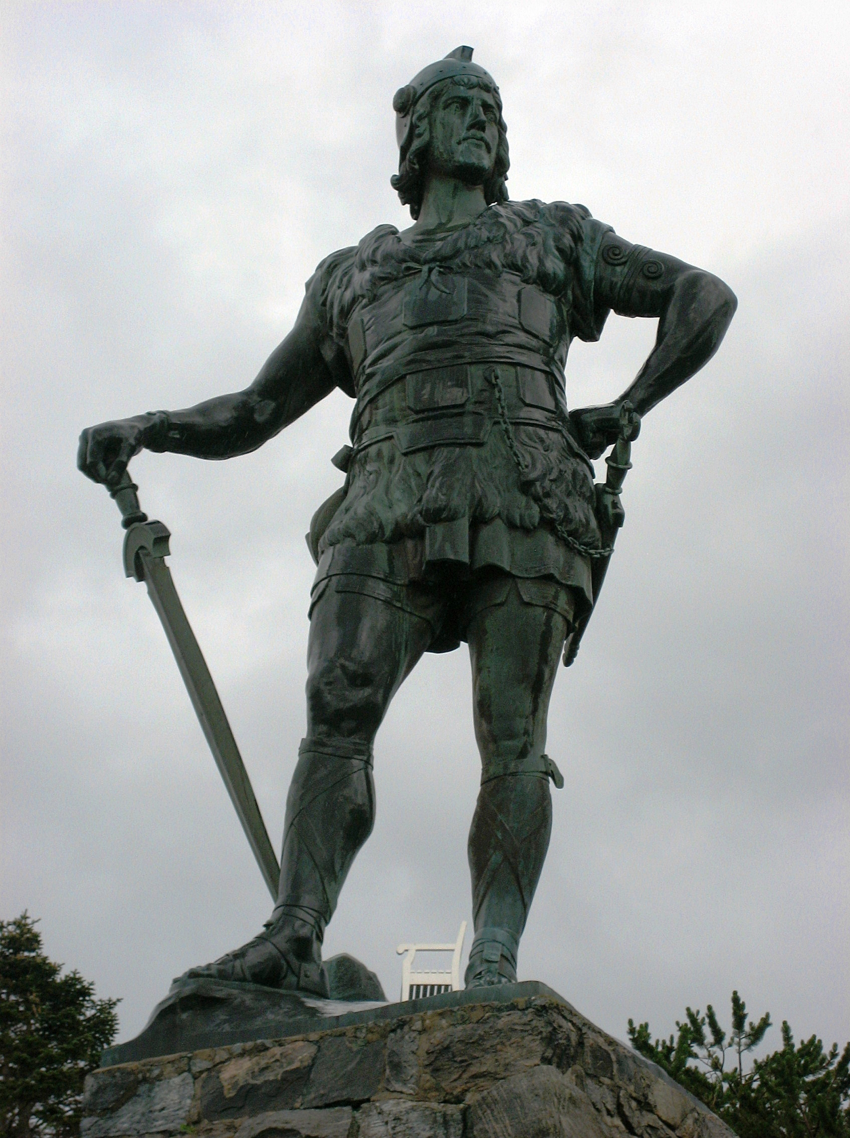 "Fridtjov der Tapfere", gedreht